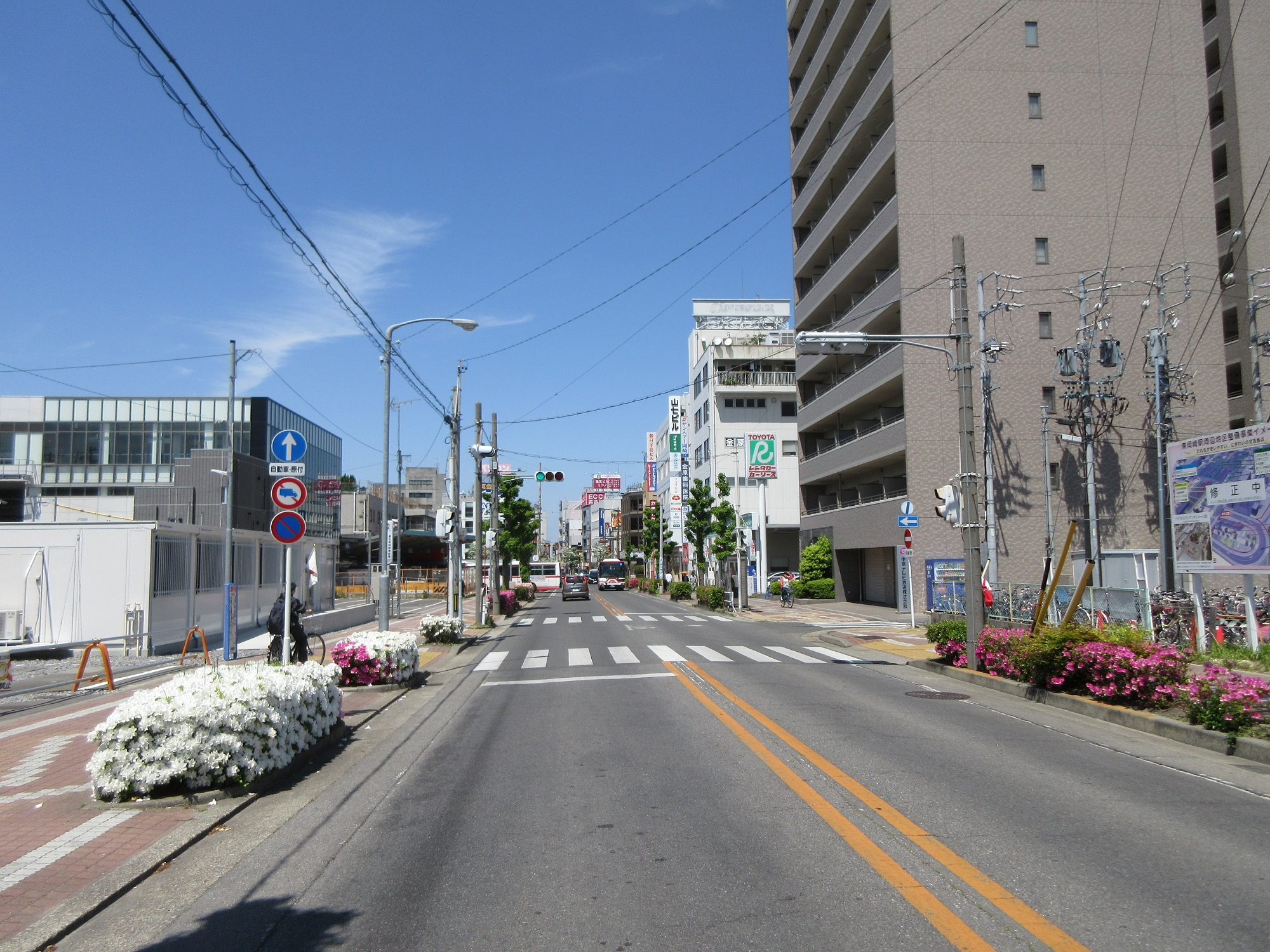 東岡崎駅前通り。駅の東側にて撮影。